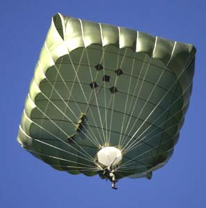 Fallschirmspringer sinkt an einem T-11 Hauptschirm zur Erde.